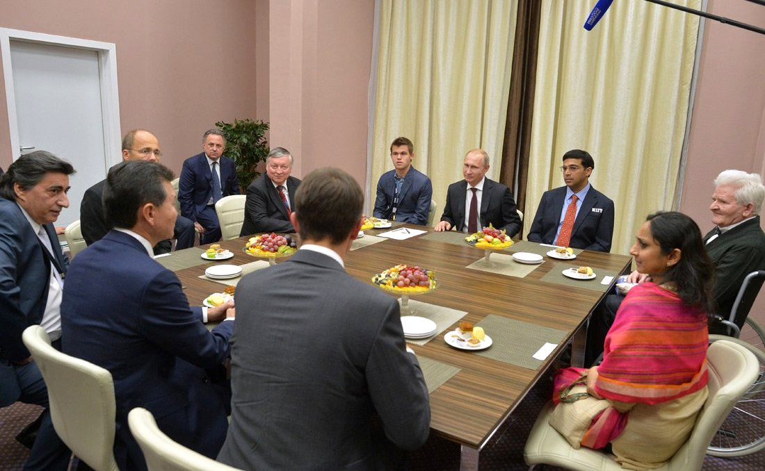 Беседа участников матча за звание чемпиона мира по шахматам 2014. Сочи.